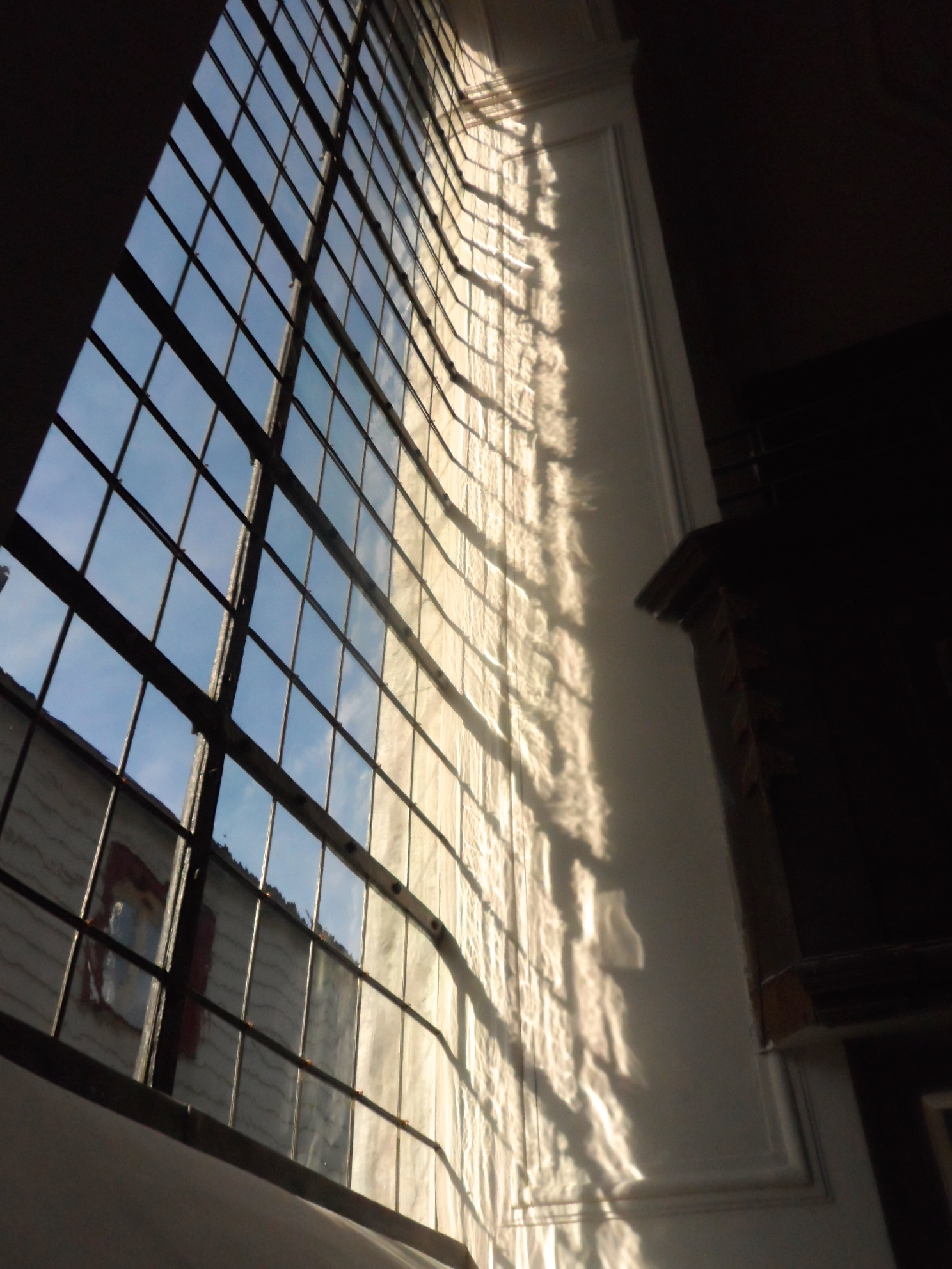 Fenster mit dem 2013-14 rekonstruierten Glas in der Fassung von 1789